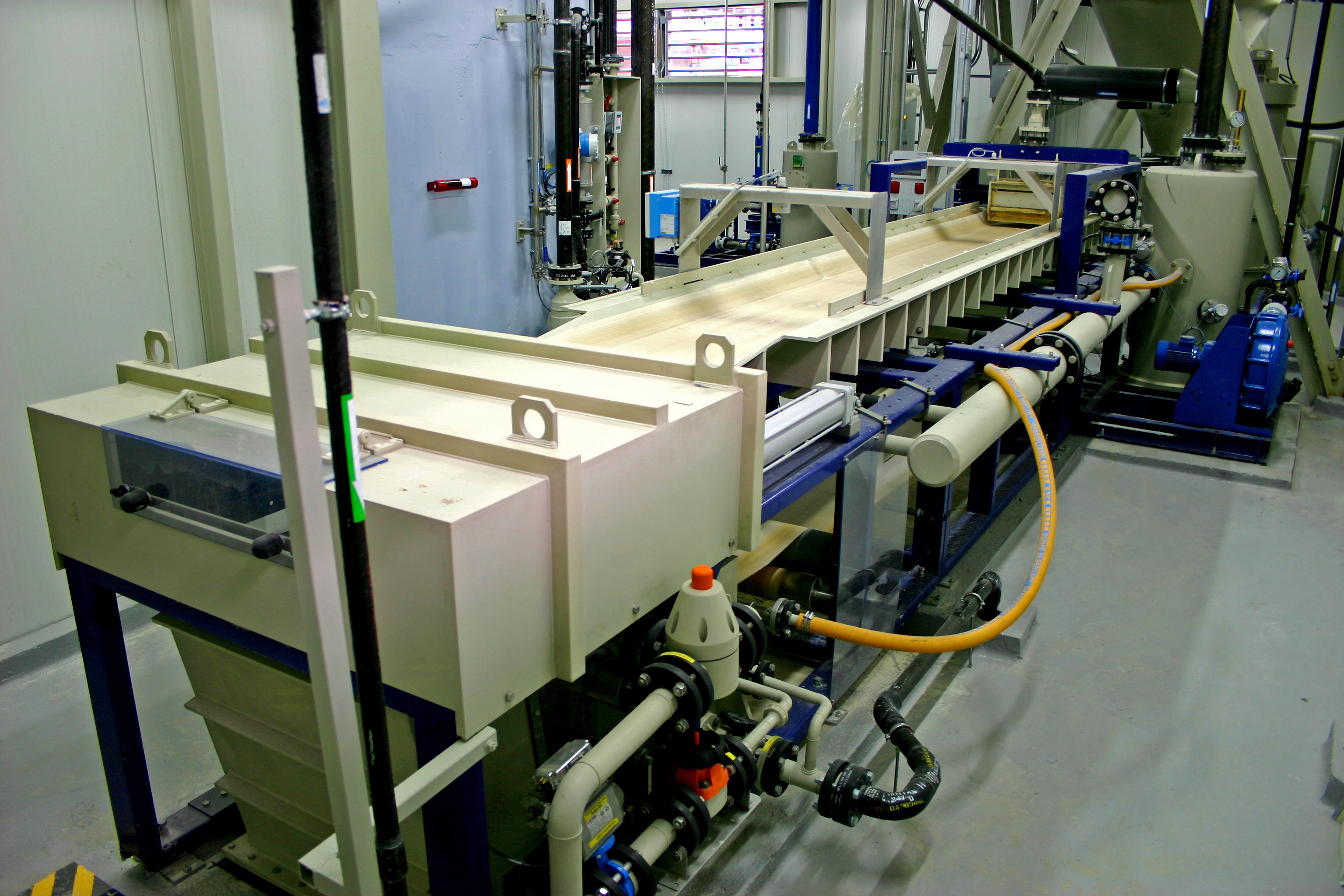 Notranjost odžveplevalne naprave